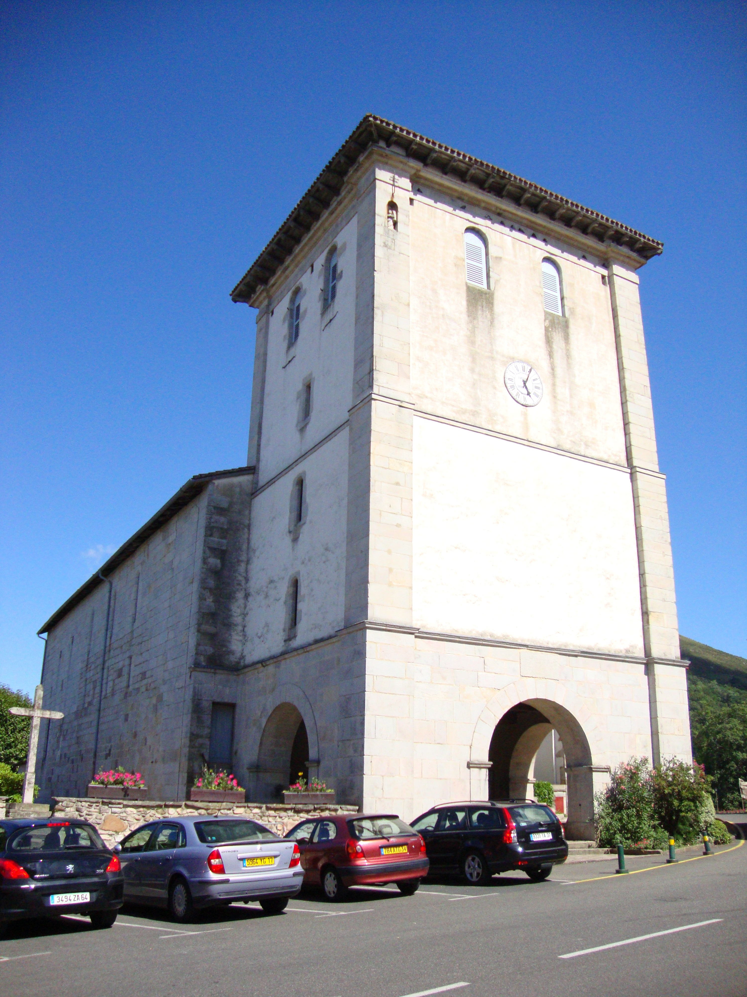 Ascain (Pyr-Atl., Fr) église.